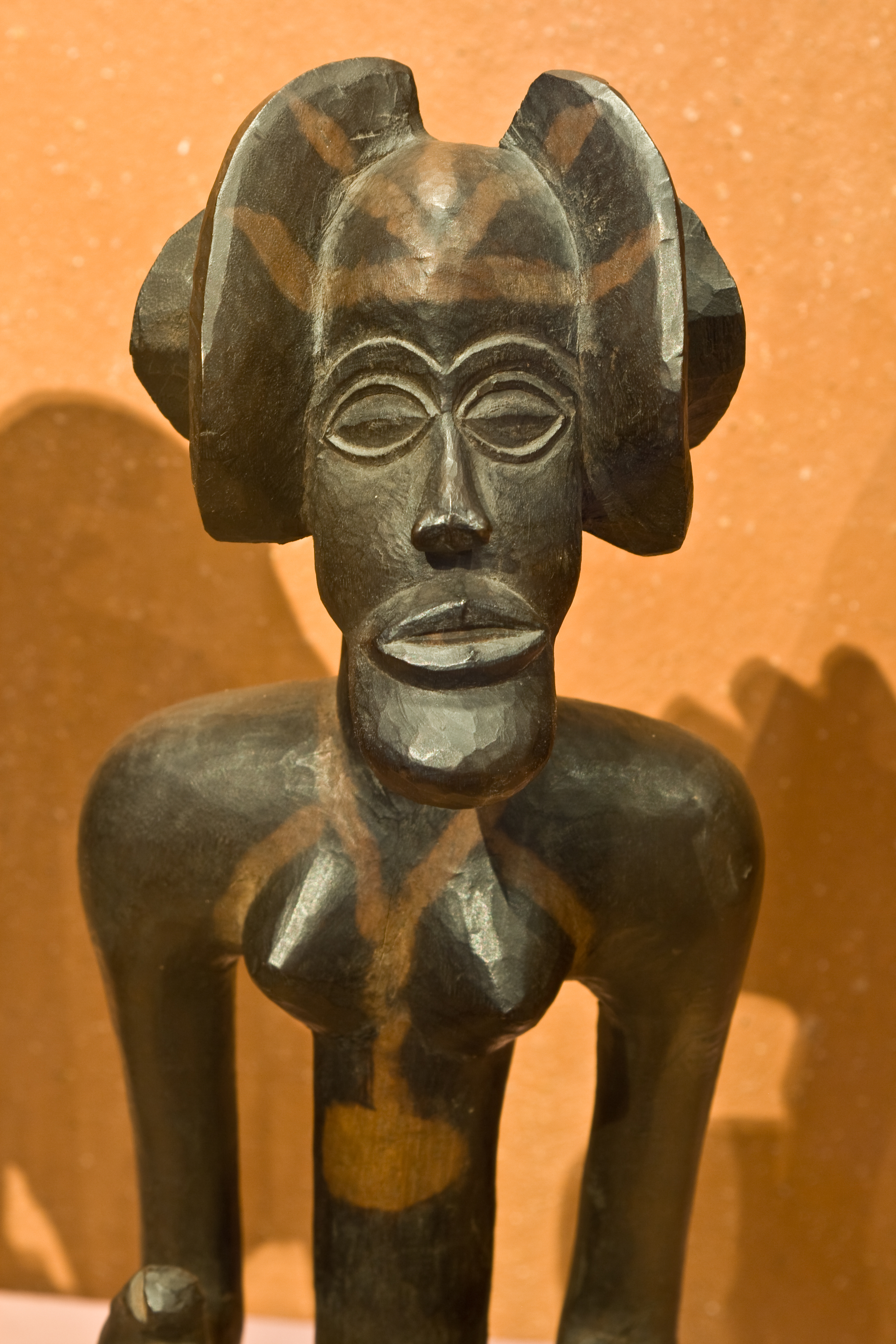 Chokwebeelden (A-11025, A-11026) Tropenmuseum - Chokwebeeld